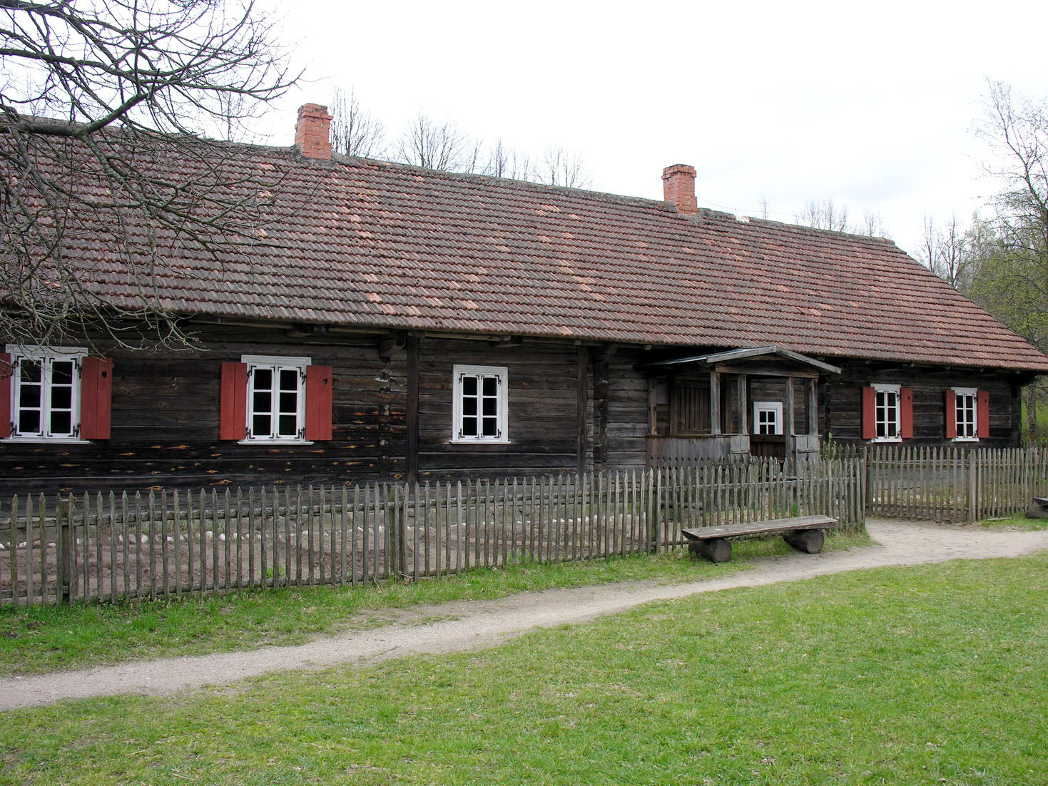 Stuba 2007 m. balandžio 21 d., Lietuva